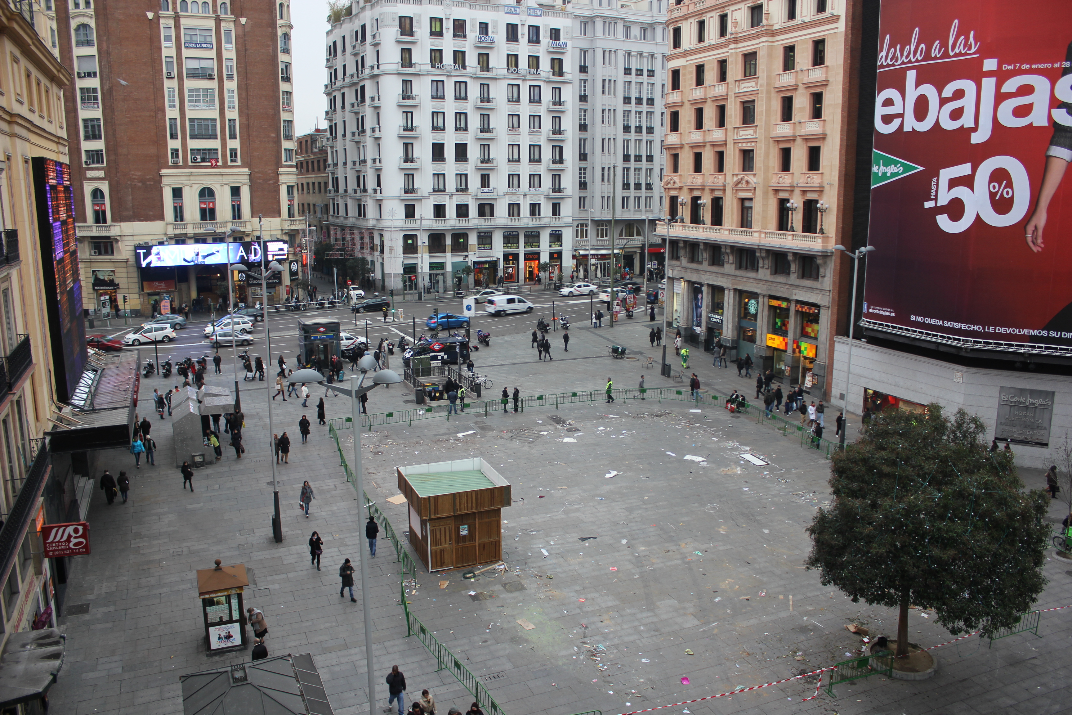 Vuelta a Madrid, con la plaza llena de mierda y el cartel de las rebajas ya puesto!